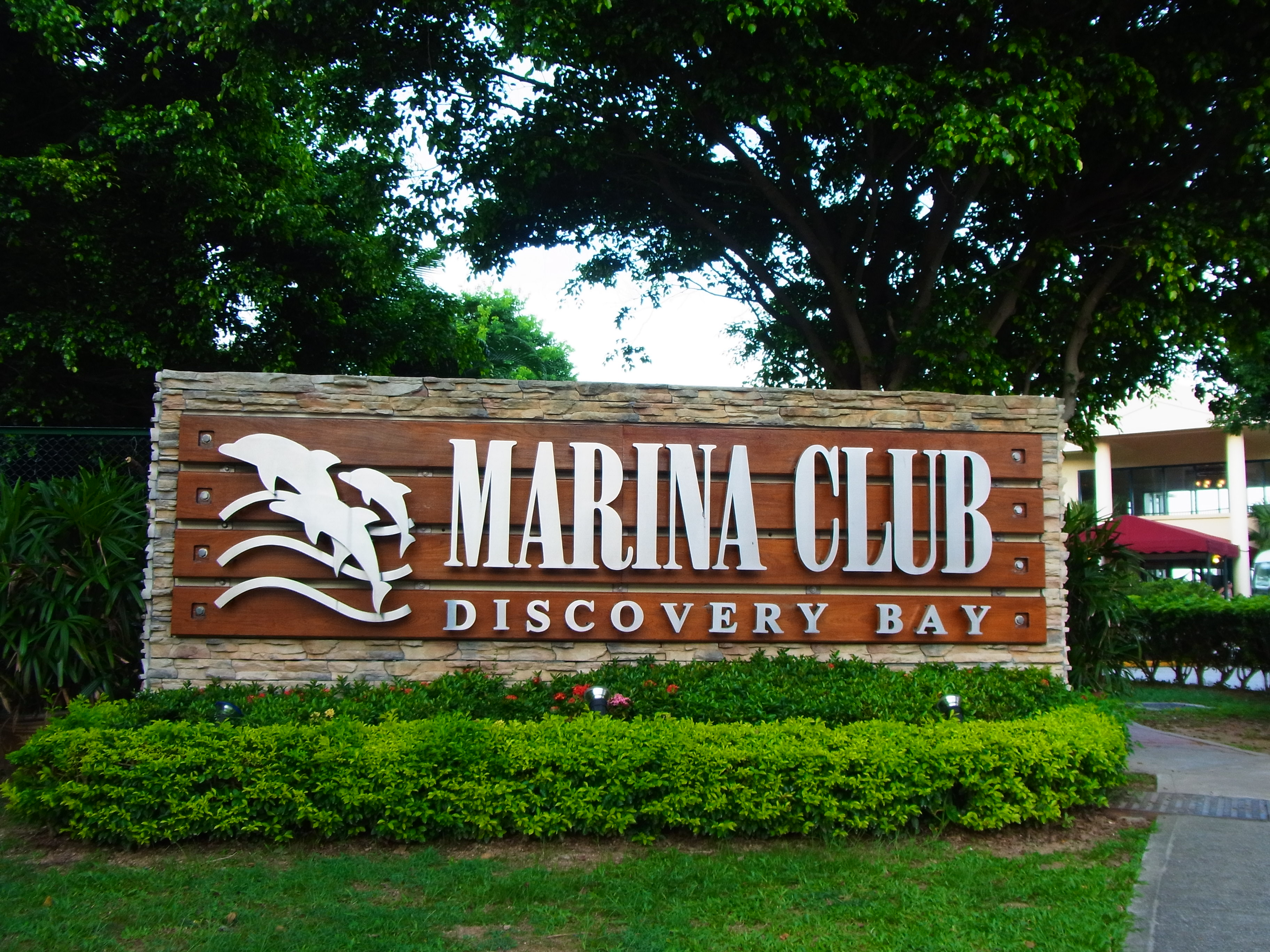 中文（香港）: 愉景灣會所